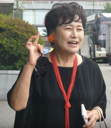 7월 13일 오후 서울시 영등포구 여의도 KBS 별관에서 '해피투게더4' 녹화가 진행됐다. 이날 녹화는 '디어 마이 프렌즈 특집'으로 김영옥X나문희X박원숙X고두심과 MC 유재석, 전현무, 조세호, 조윤희가 출연한다.